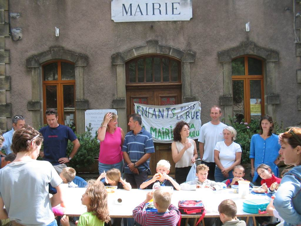 Manifestation de parents à Bellegarde-du-Razès pour obtenir un local pour la distribution des repas.